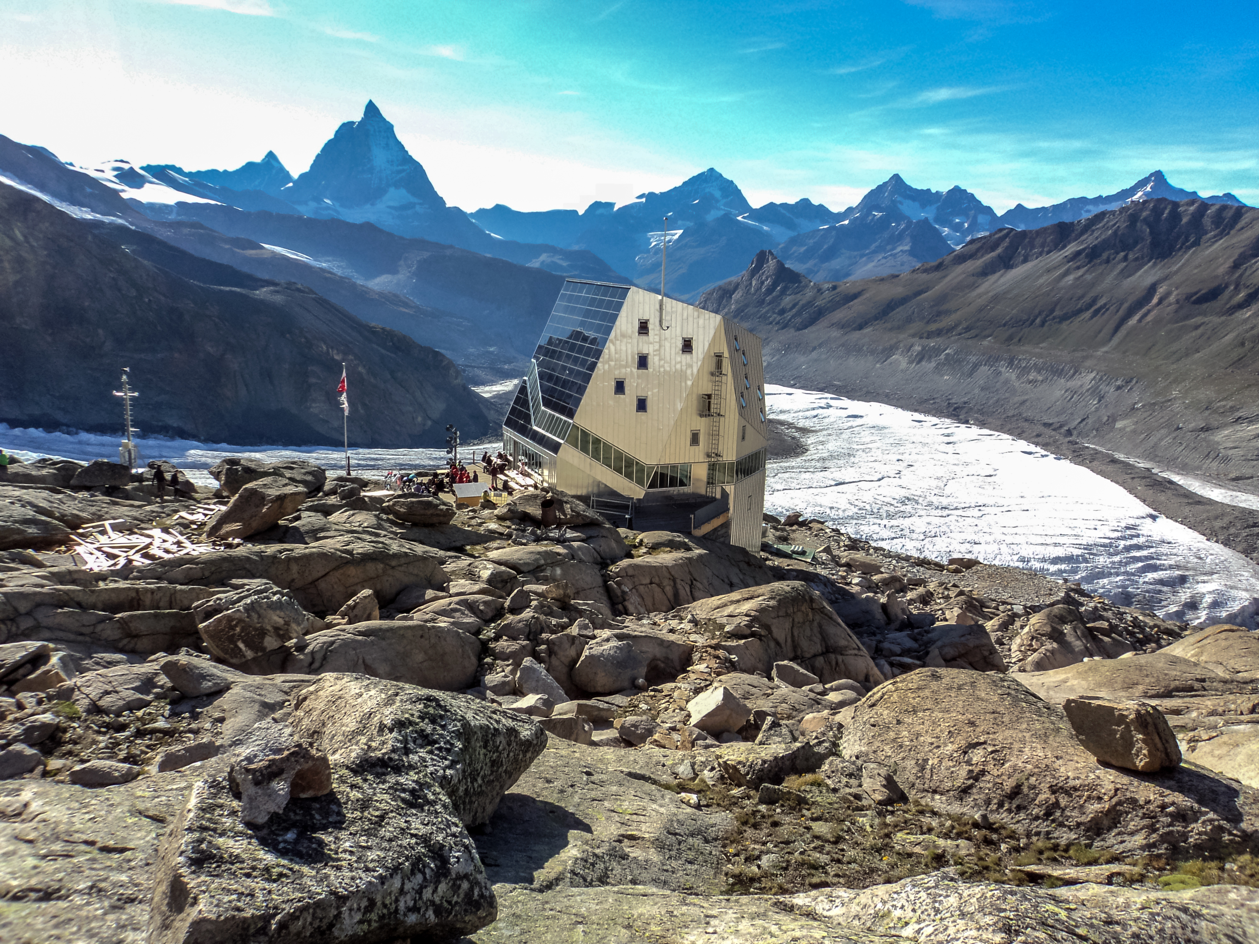 La nuova Monte Rosa Hutte con sullo sfondo il Cervino ed in basso il ghiacciaio del Gorner - Mattertal - Alpi Pennine